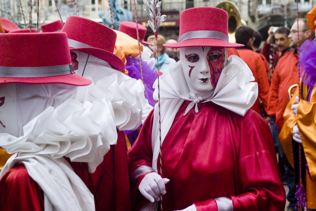 Pierrots du Carnaval de Limoux dans l'Aude en France